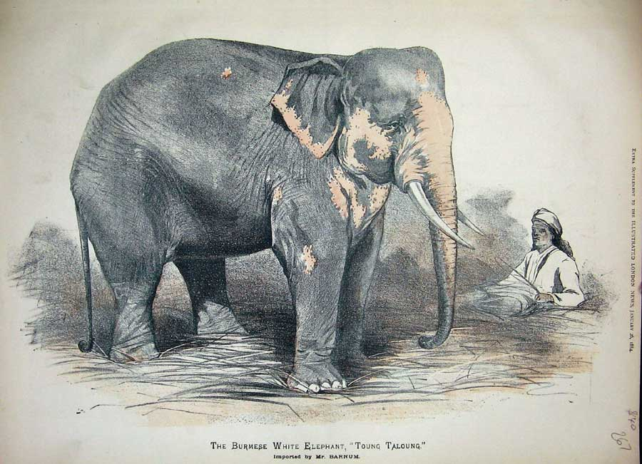 Der weiße Elefant Toung Taloung, den P. T. Barnum 1884 nach Amerika einführte.